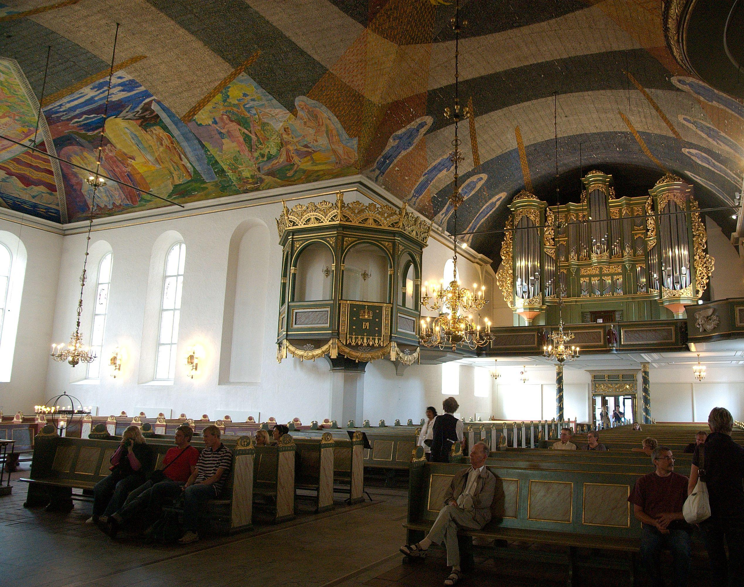 Oslo Domkirke, kongestol og orgel. Lambert Daniel Kastens sto for byggingen av barokkorgelet i 1720-årene og det ble ferdig i 1727. Det er ingen piper bevart fra dette, men selve orgelfasaden er fremdeles i bruk.